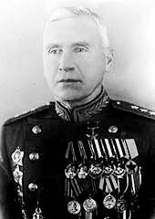 Вячеслав Дмитриевич Цветаев (1893 — 1950) — советский военачальник